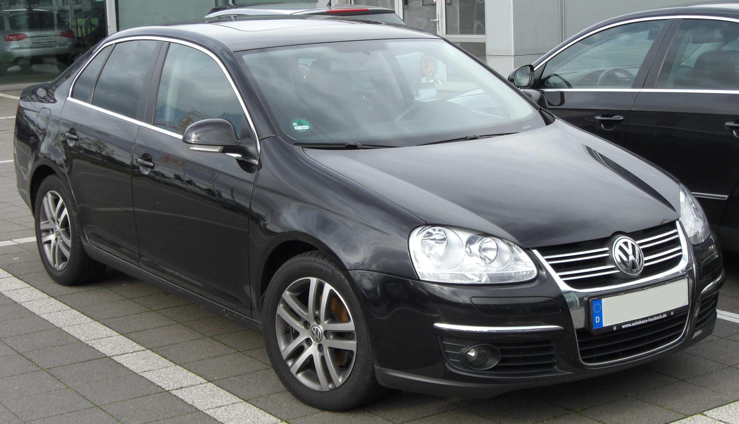 VW Jetta